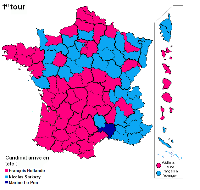 Candidat arrivé en tête au premier tour de l'élection présidentielle française de 2012 par département